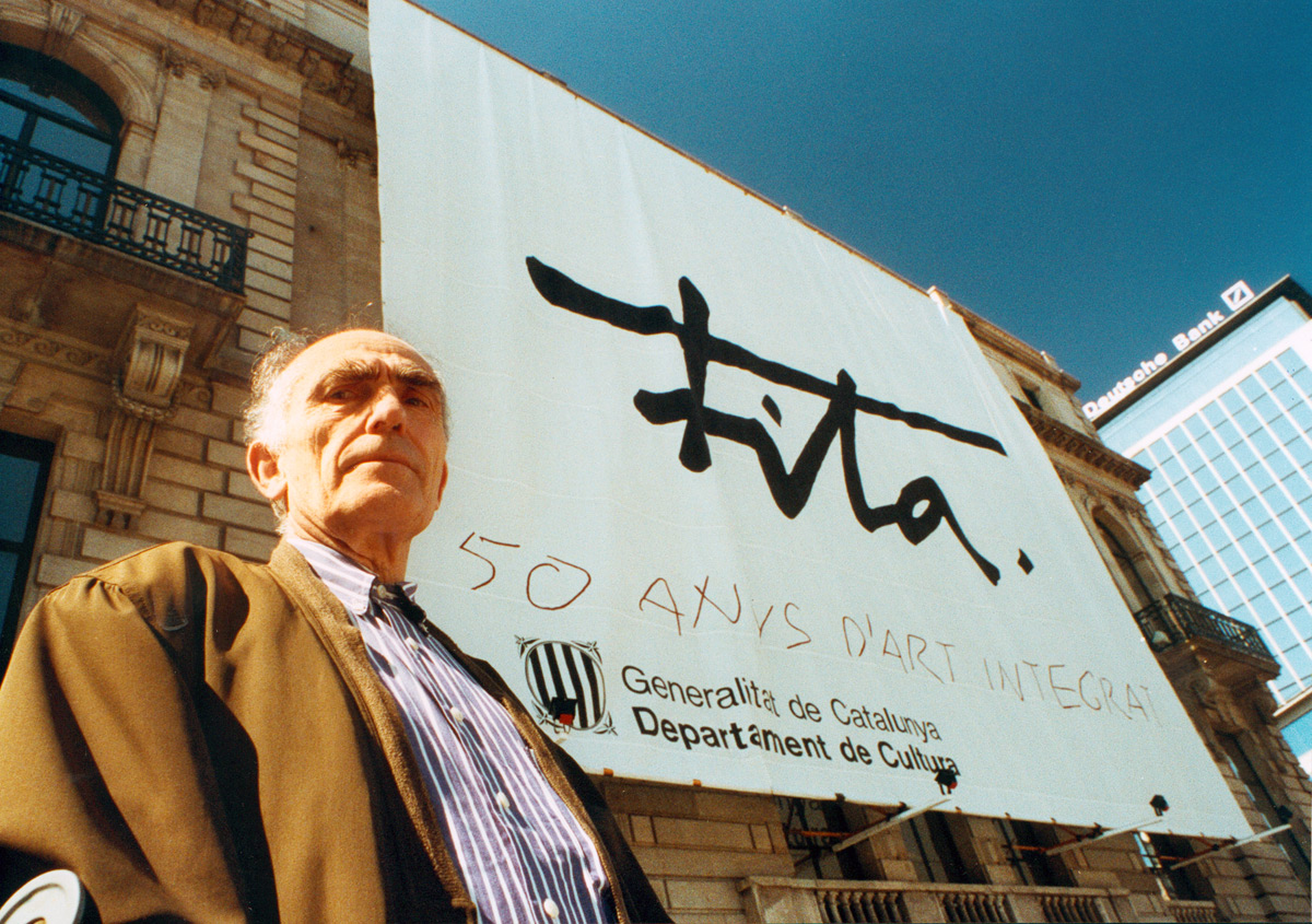 Domènec Fita davant del Palau Robert de Barcelona, 1994.